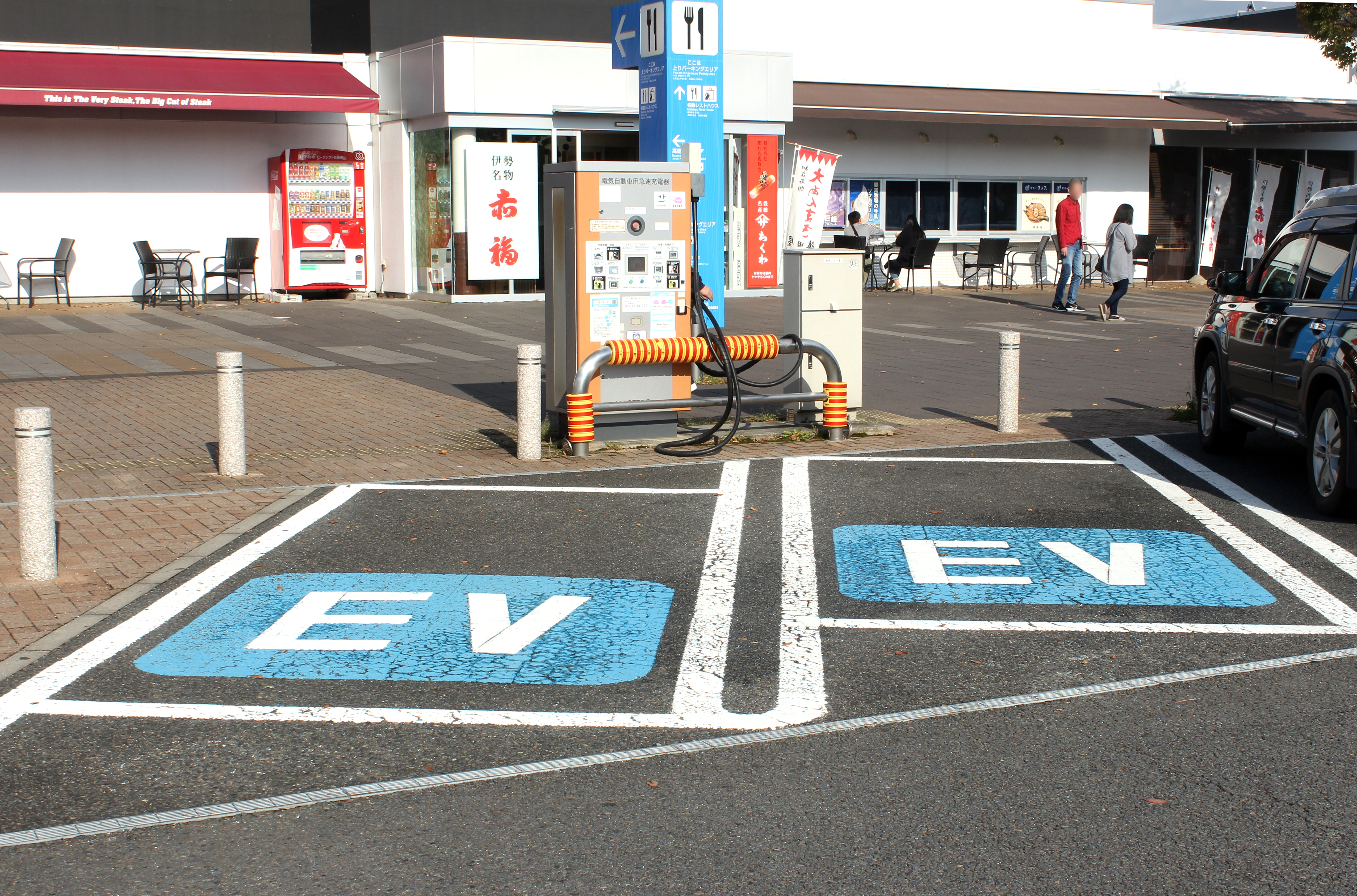 刈谷パーキングエリアの電気自動車充電のための駐車スペース（上り側）